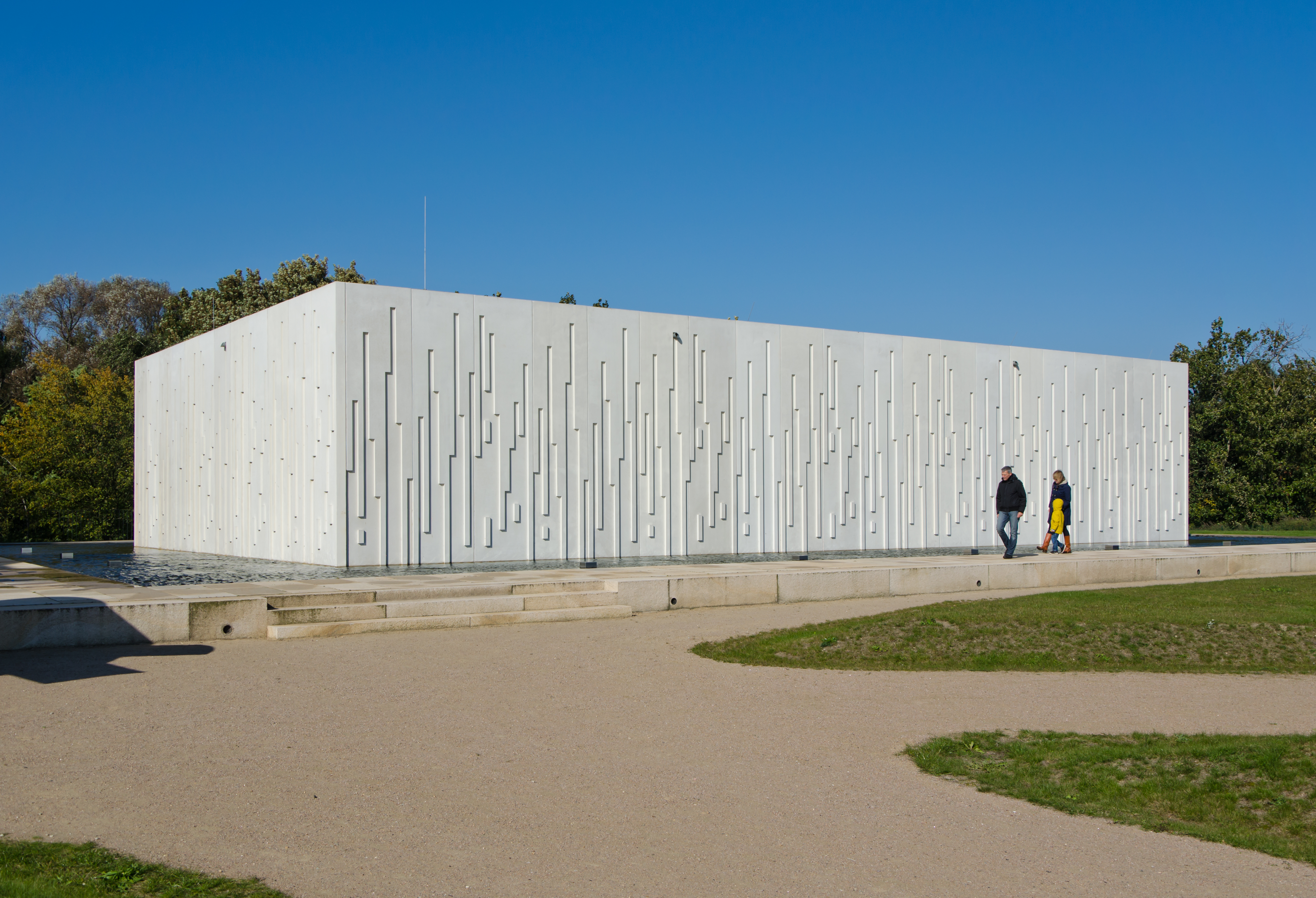 Hamburg-Rothenburgsort Villa Kaltehofe Nebengebäude